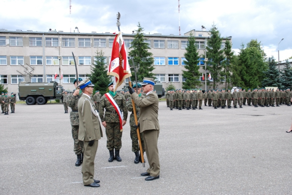 Garnizon Przasnysz, 2012r. Przekazanie obowiązków dla nowego dowódcy 2 Ośrodka Radioelektronicznego